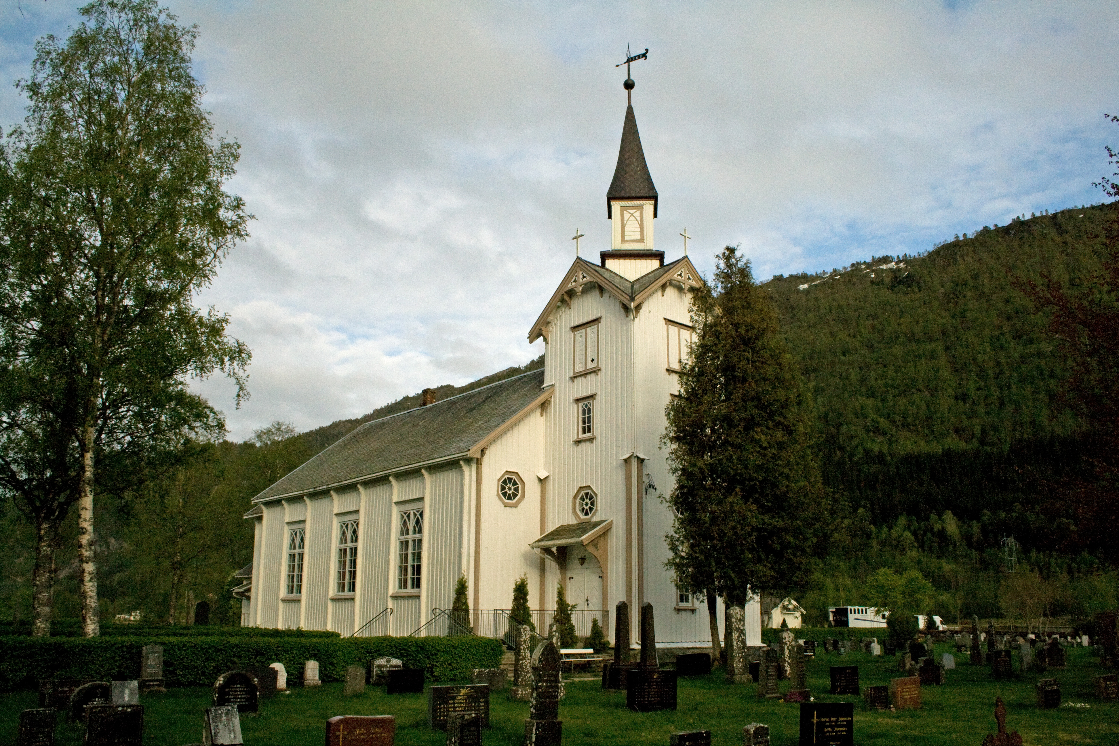 Norsk (nynorsk): Ranes kyrkje i Surnadal